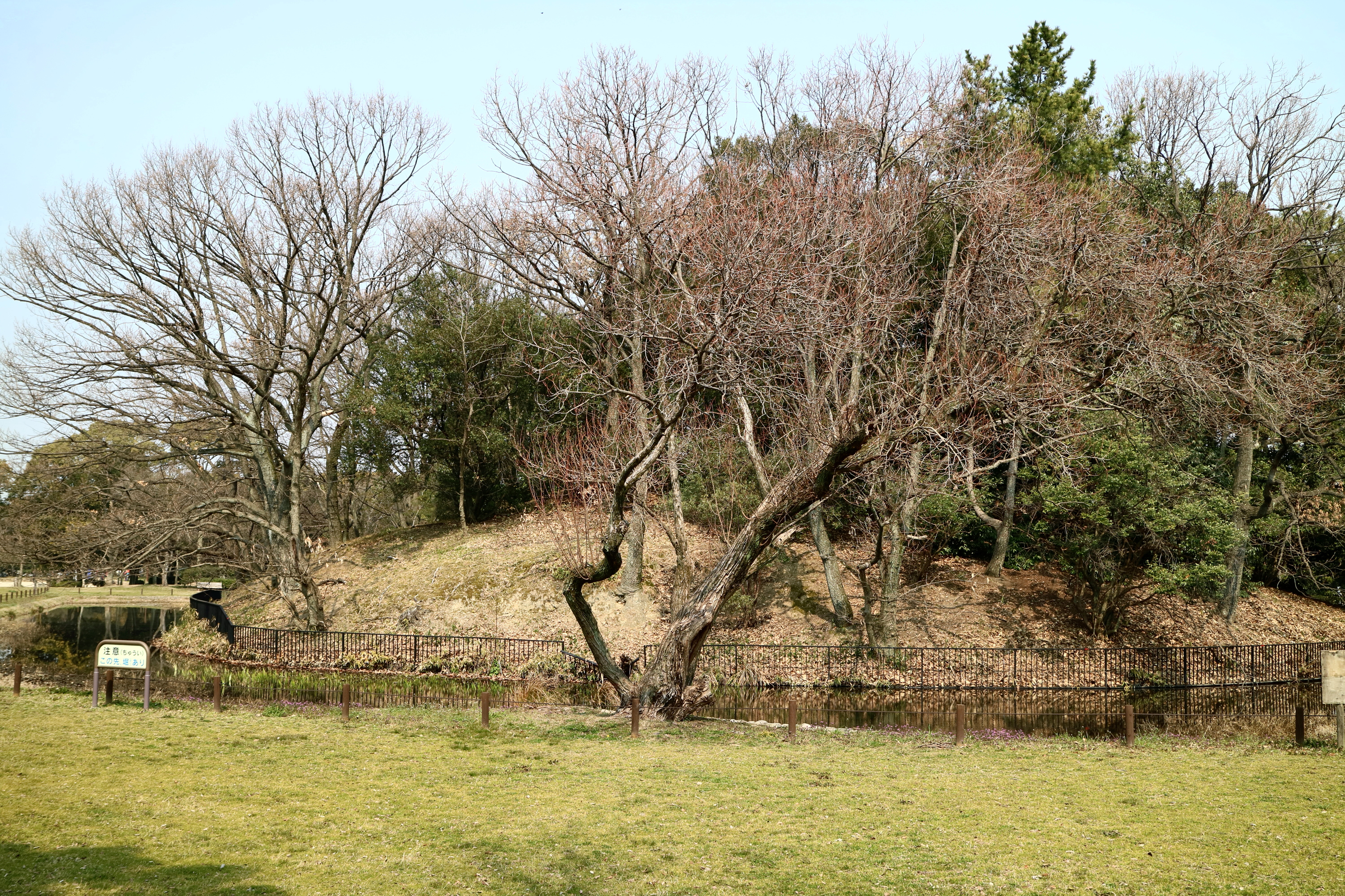 孫太夫山古墳